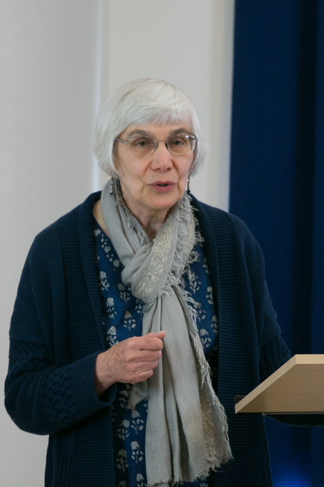 Anna Löwenstein prelegas dum la 44a Malferma Tago de la Centra Oficejo de Universala Esperanto-Asocio, aprile 2016.